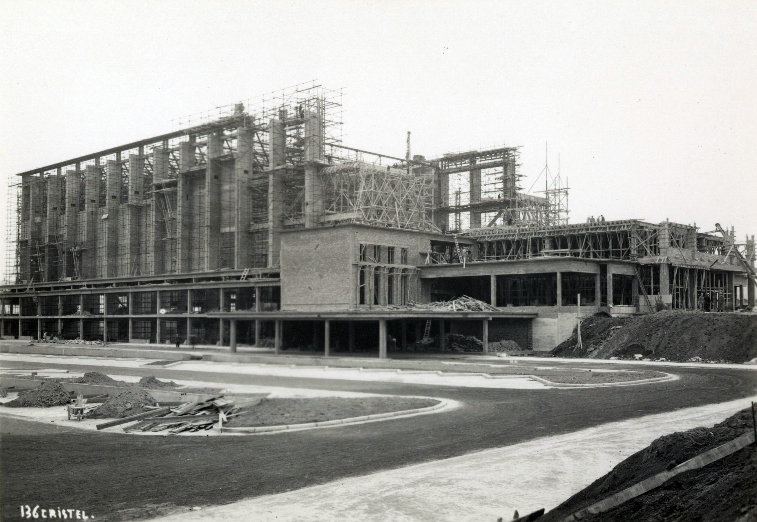 Construction du palais permanent 1939